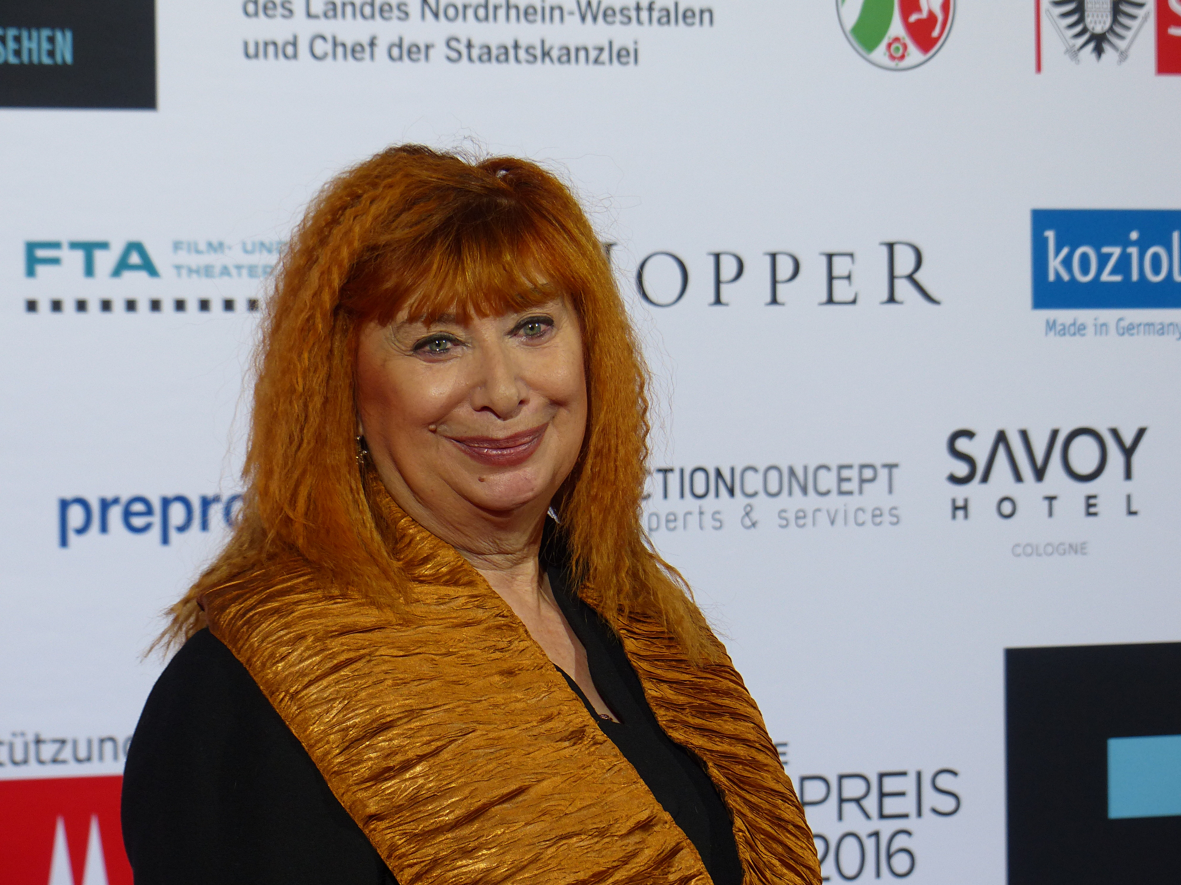 Inge Maux bei der Verleihung zur Auszeichnung 2015, durch die Deutsche Akademie für Fernsehen, im November 2015.